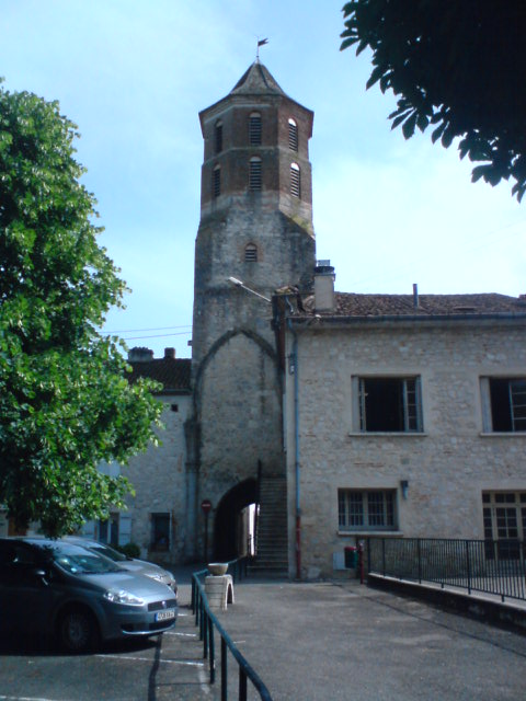 place du Royal de Layrac, tour isolée servant de clocher à l'église Saint-Martin